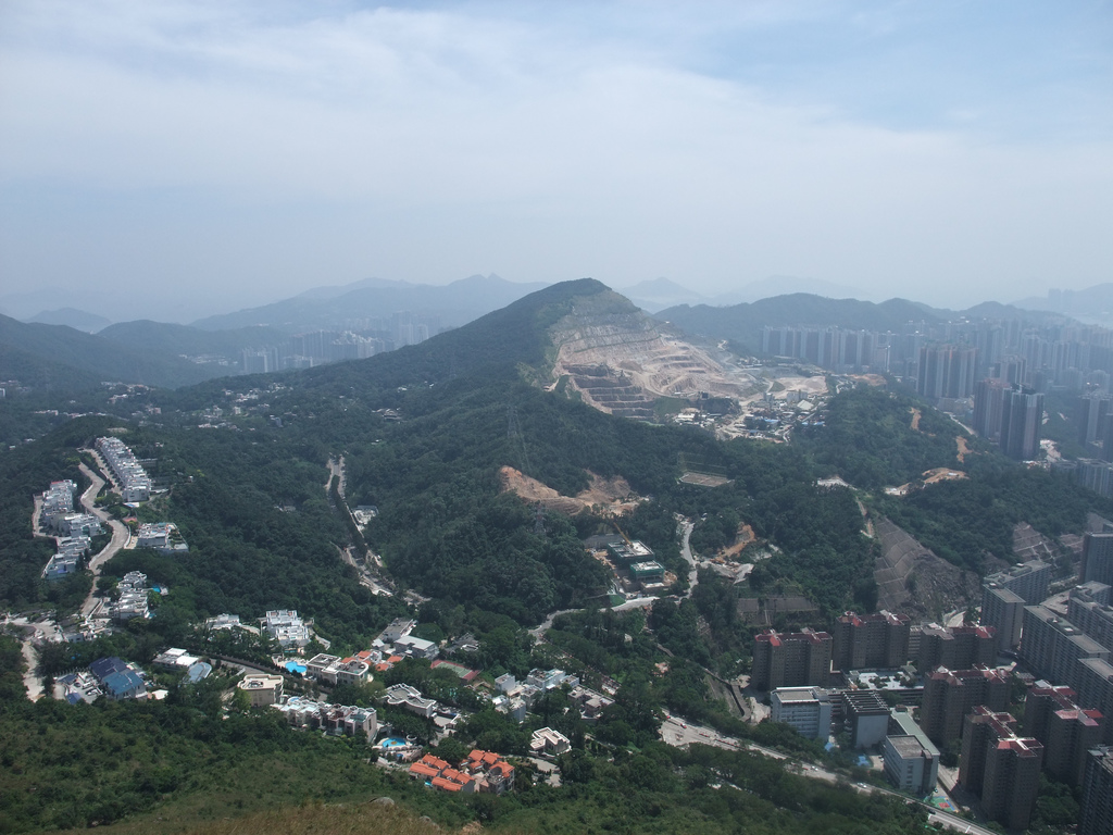 順利邨 安達臣道石礦場